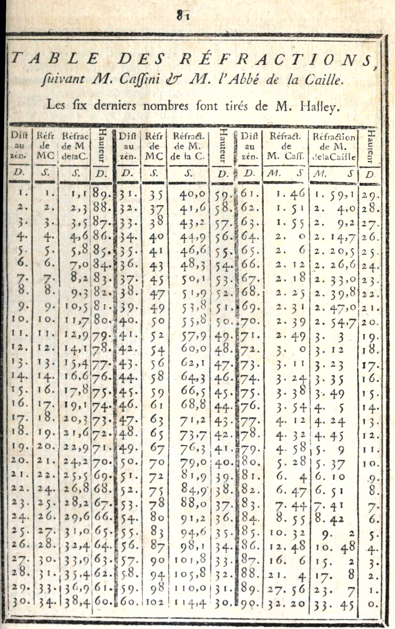 Table des réfractions suivant J-D Cassini et La Caille.